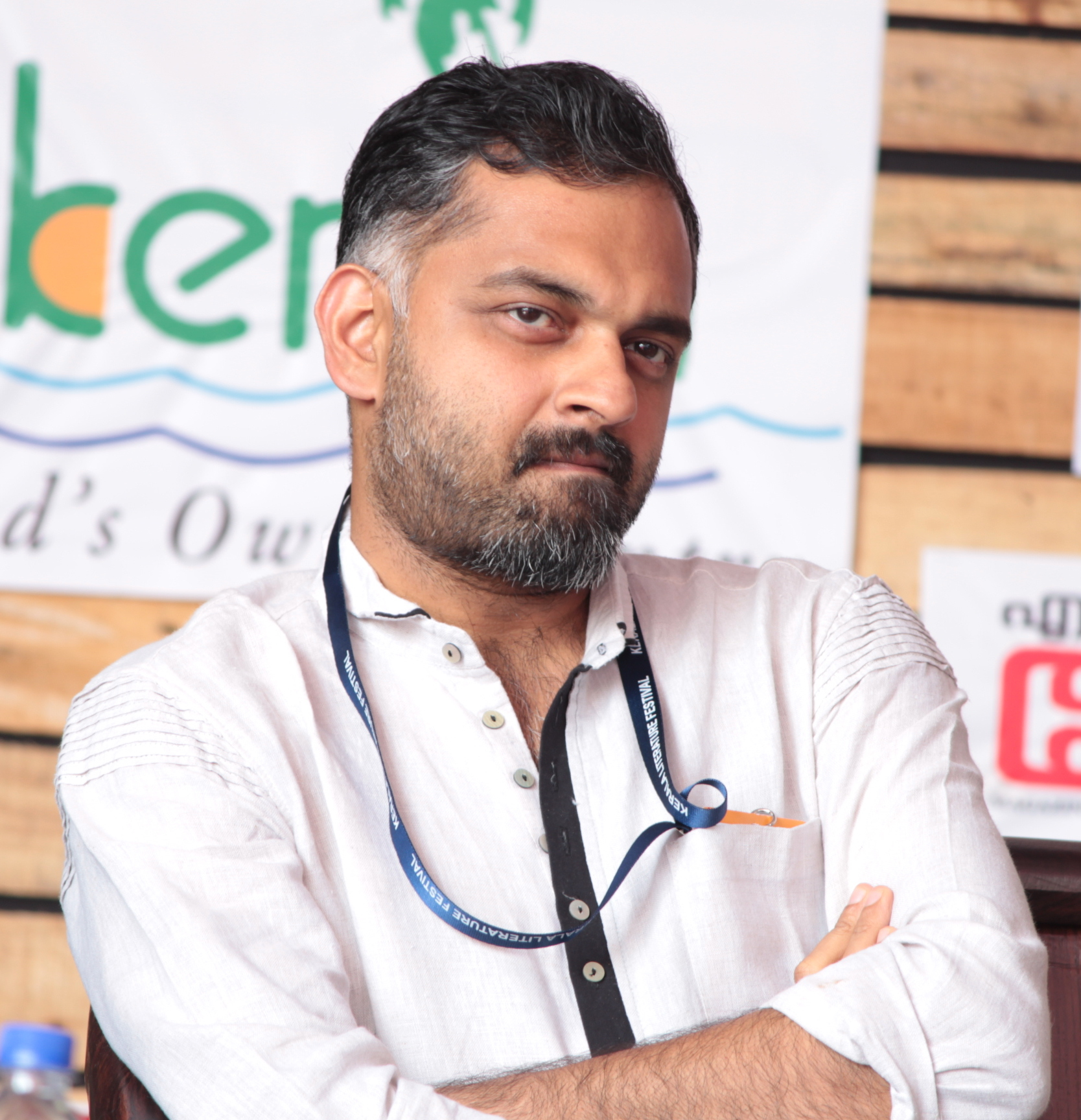 മലയാളം സിനിമാ സംഗീതസംവിധായകന്‍.